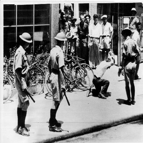 1938 - הפגנת יהודים נגד תלייתו של בן יוסף